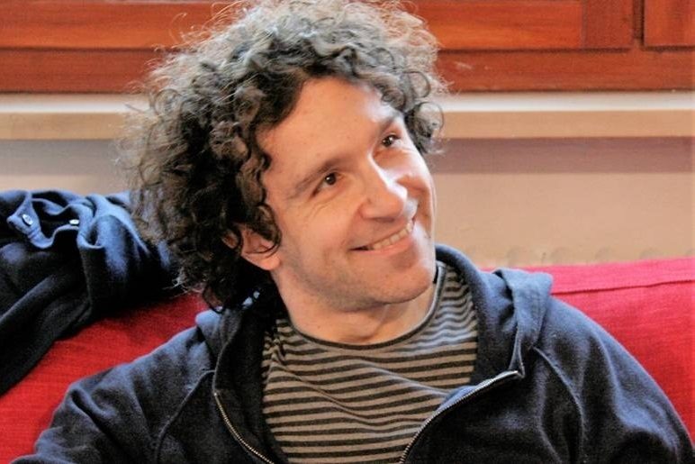 Marco Balzano (2019)